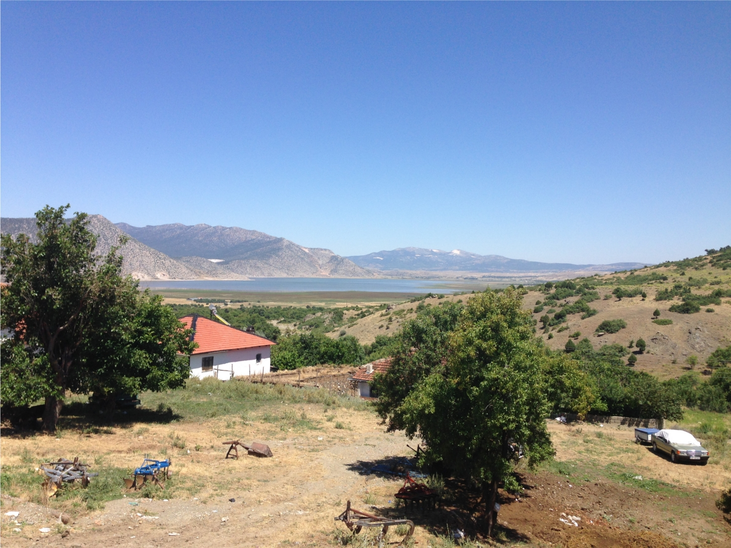 Vue du village de Yukarı Kırlı vers le lac Akgöl